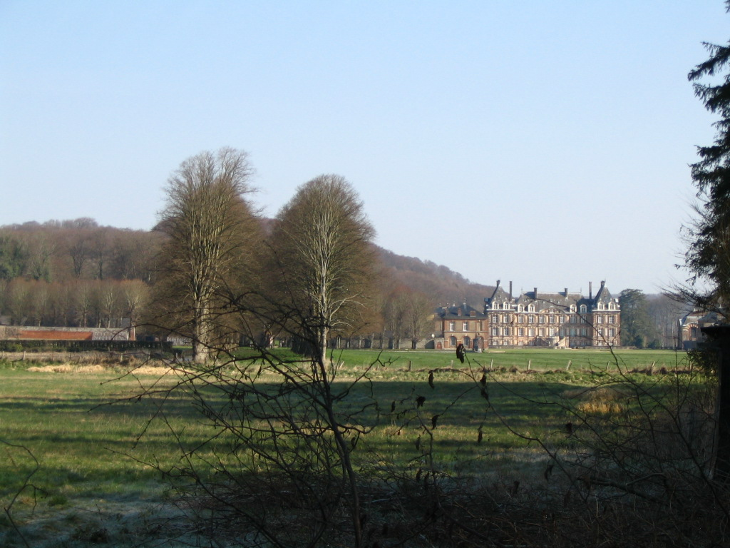 Le château de Cany, à Cany-Barville, France